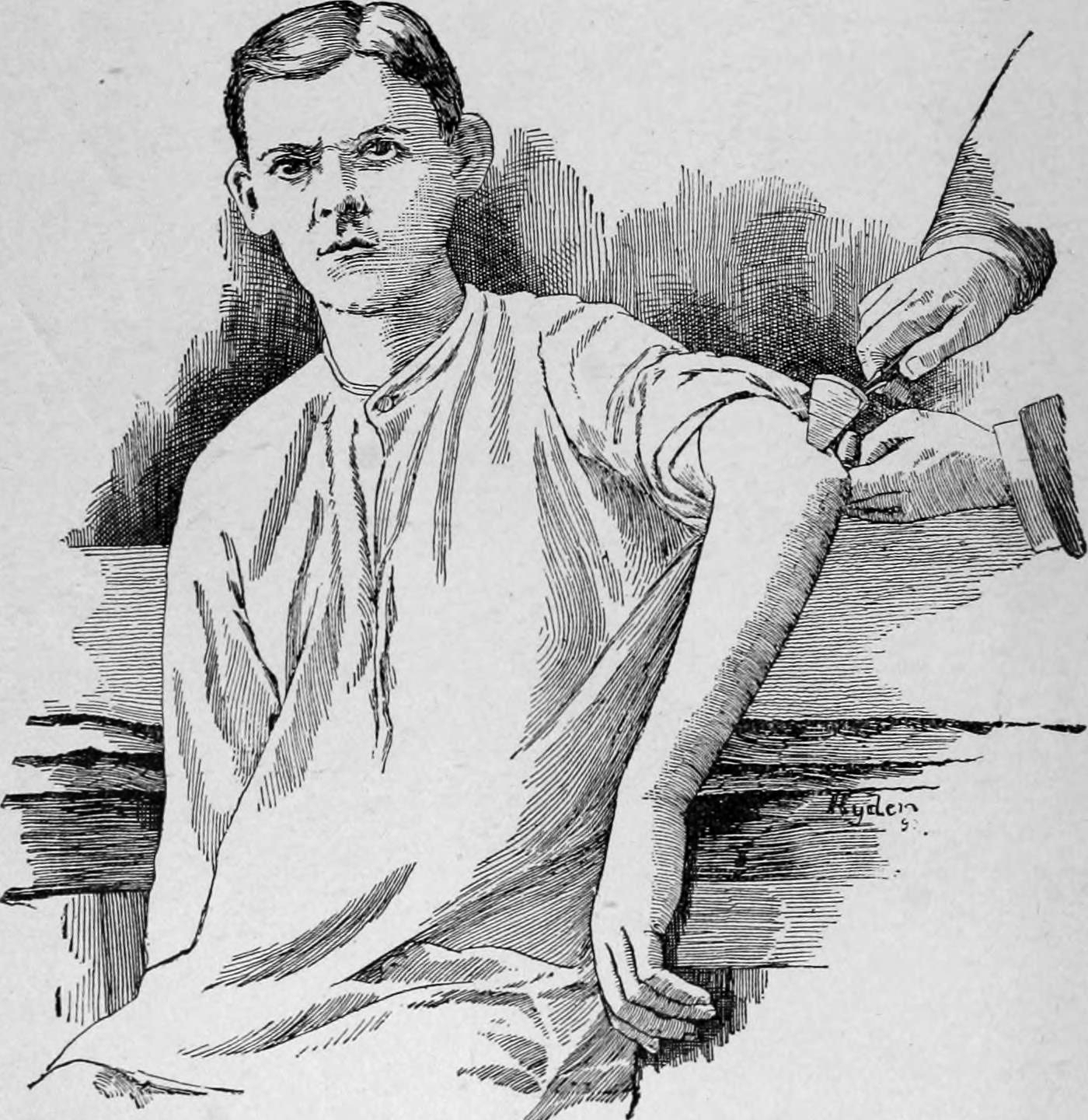 De tricepsreflex; afbeelding uit het "Text-book of nervous diseases; being a compendium for the use of students and practitioners of medicine" (1901), uitgegeven door New York, W. Wood and Company